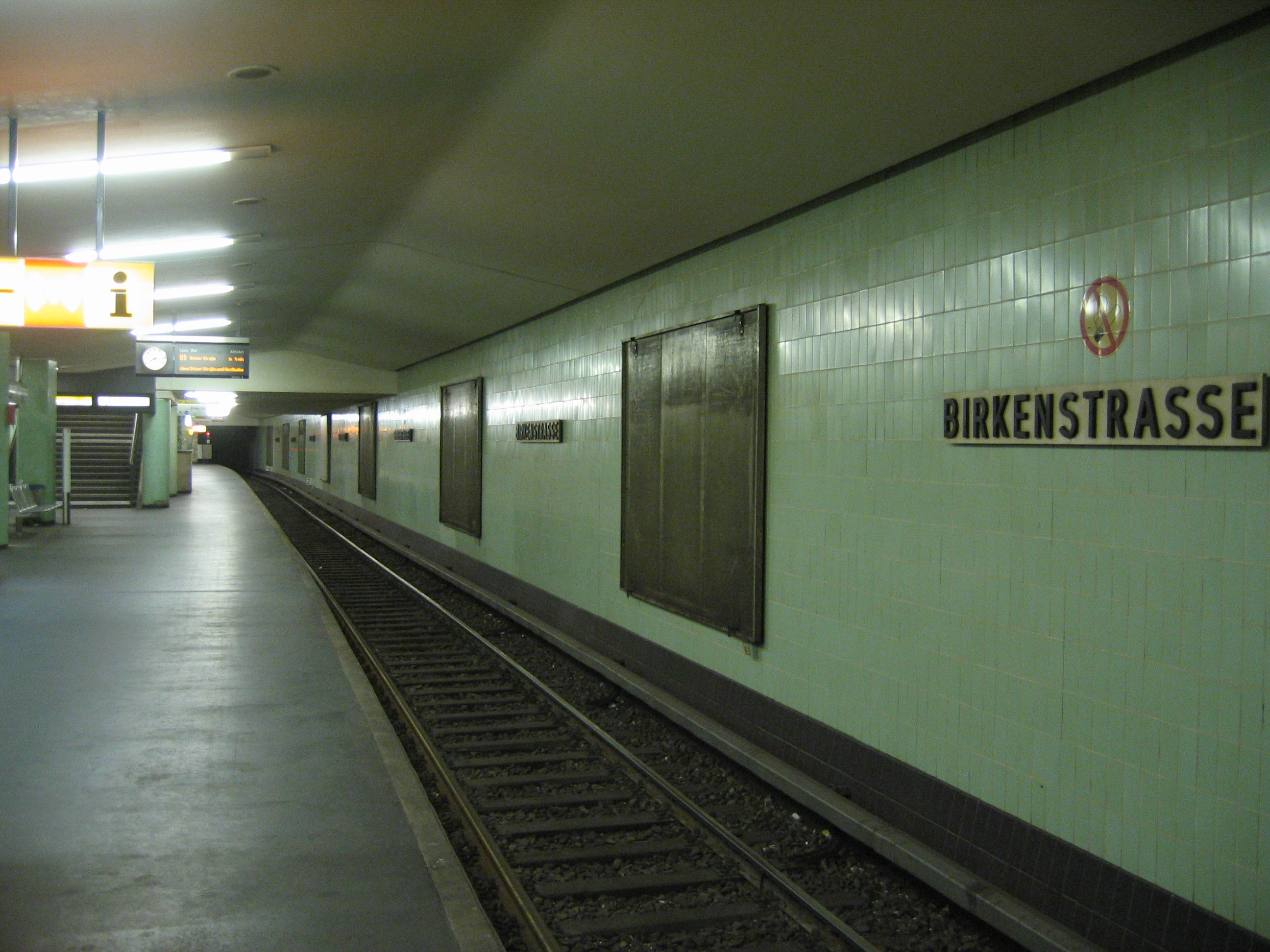 U-Bahnhof Birkenstraße, Berlin